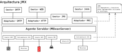 Diagrama de capas de la implementación de la arquitectura JMK